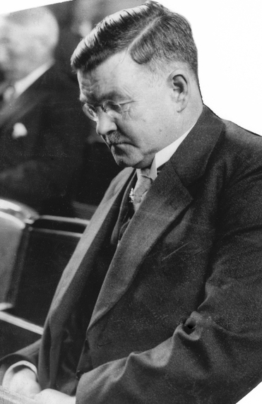 portrett, mann, jurist, byrettsdommer, sittende halvfigur, halvprofil.